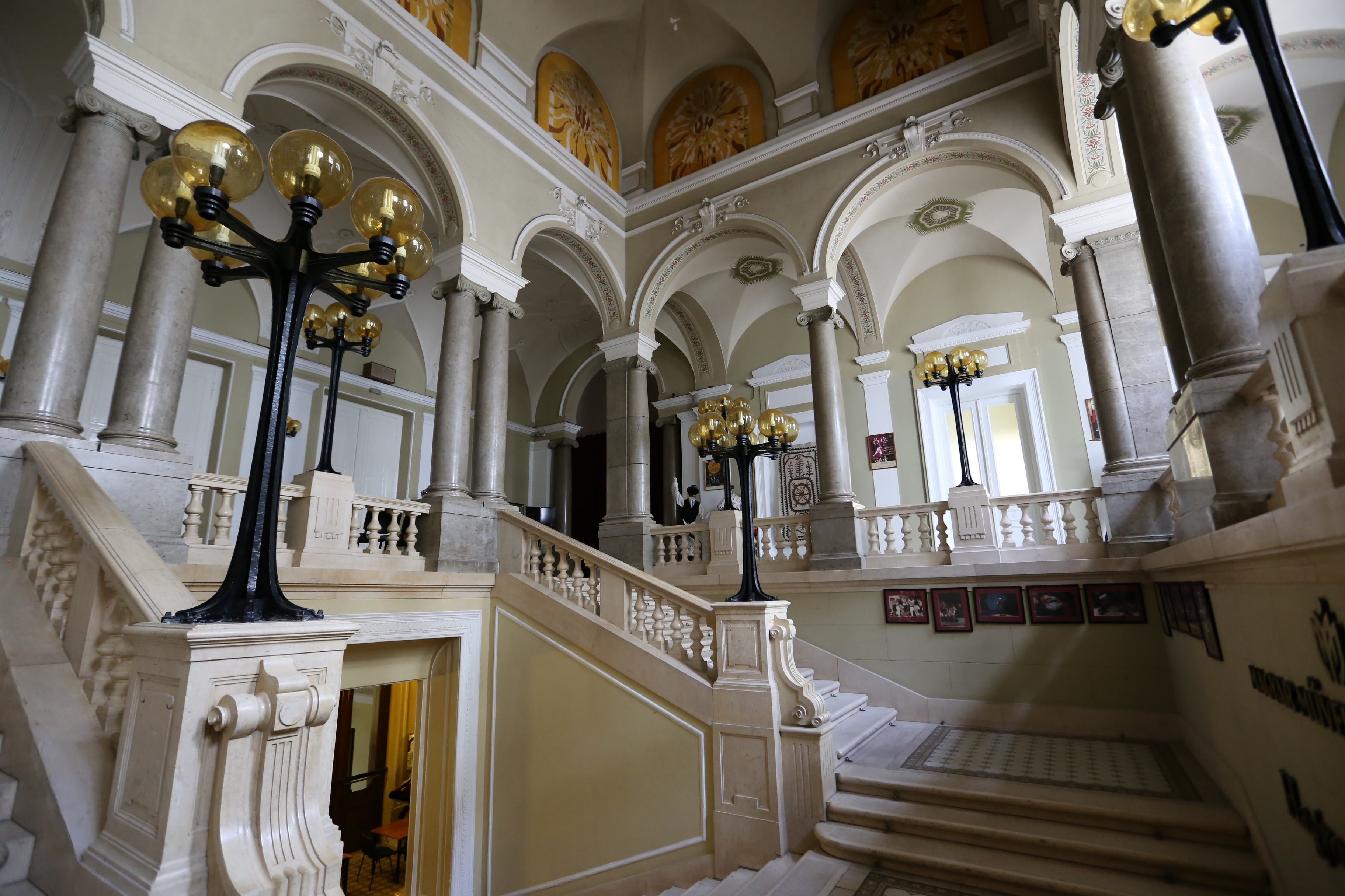 Budai Vigadó This is a photo of a monument in Hungary. Identifier: 12221